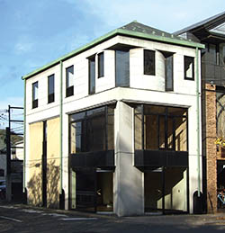 古田織部美術館 外観